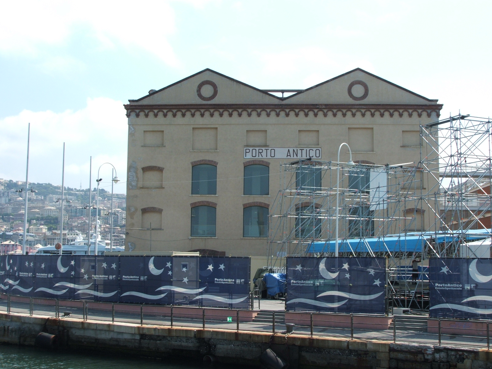 Immagine dal porto antico di Genova, Italia: Magazzini del Cotone (Arena estiva all'aperto).